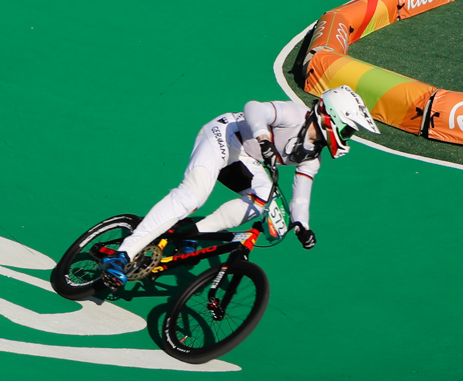 Rio de Janeiro - Ciclista alemão Luis Brethauer compete BMX nos Jogos Olímpicos Rio 2016, no Parque Radical em Deodoro (Fernando Frazão/Agência Brasil)